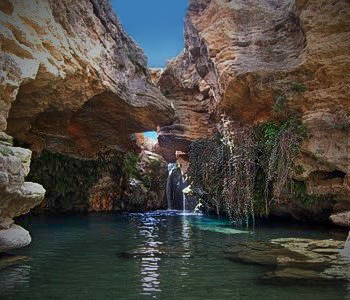 Paisaje Natural Salto del Usero